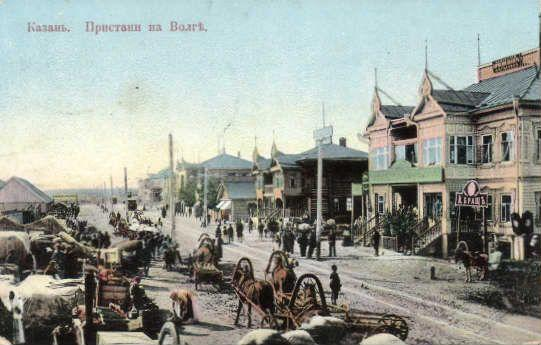 Казань. Пристани на Волге. Открытка.